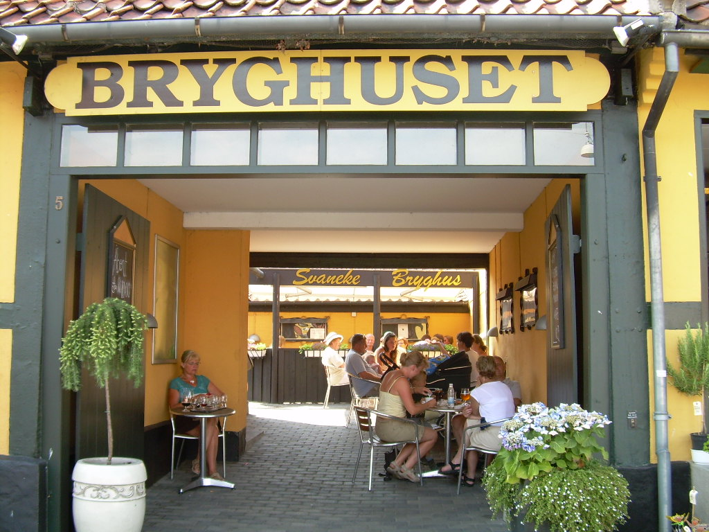 Svaneke Brewery, Bornholm, Denmark